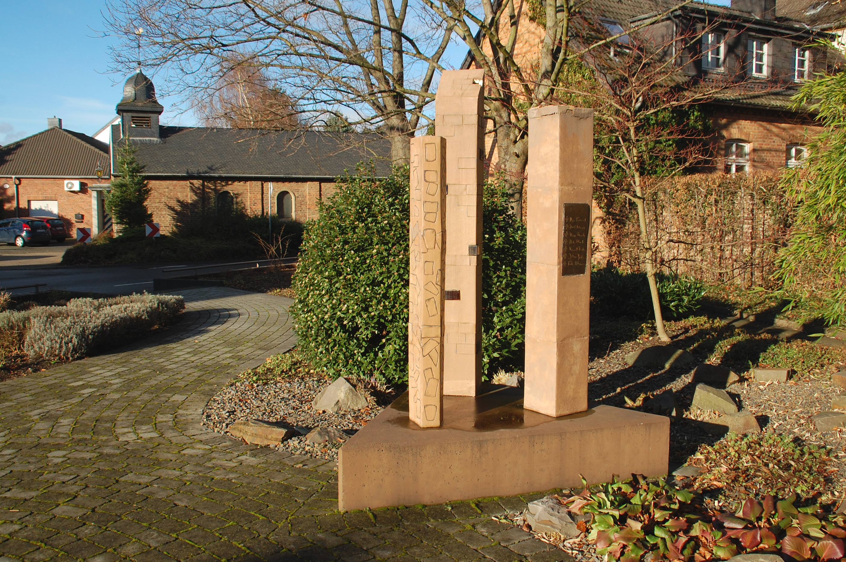 Mahnmal Annengartenplatz in Köttingen, Erftstadt, Nordrhein-Westfalen